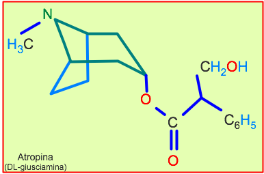 Atropina Autore: P. Forster Fonte: inedita Produzione: 3mar2005 in .graffle, esportato in .png Categoria:Immagini di chimica